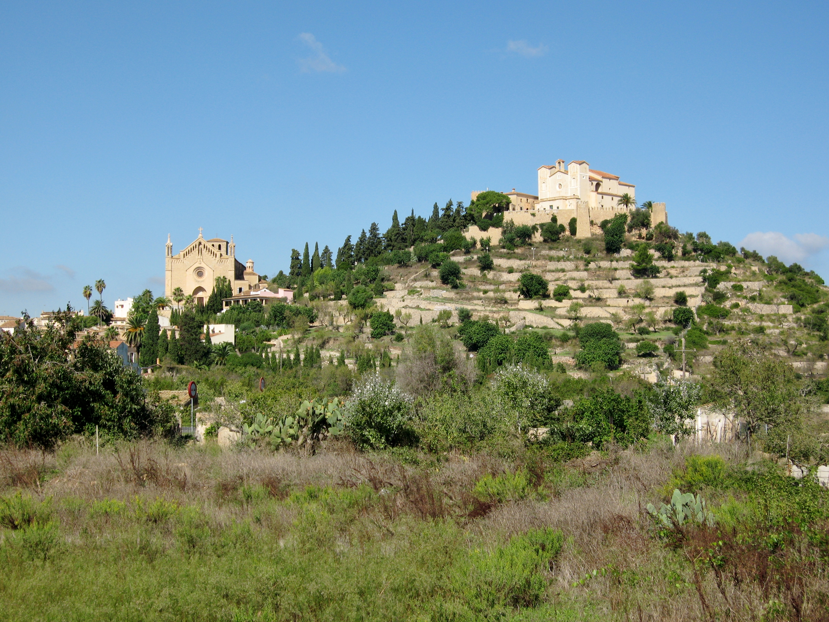 Artà, Mallorca, Spain